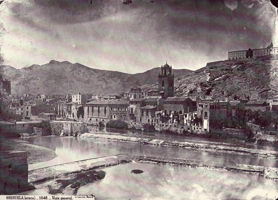 Vista general de la ciutat d'Oriola, al Baix Segura, País Valencià. Dècada de 1870, foto de J. Laurent (1816-1886).